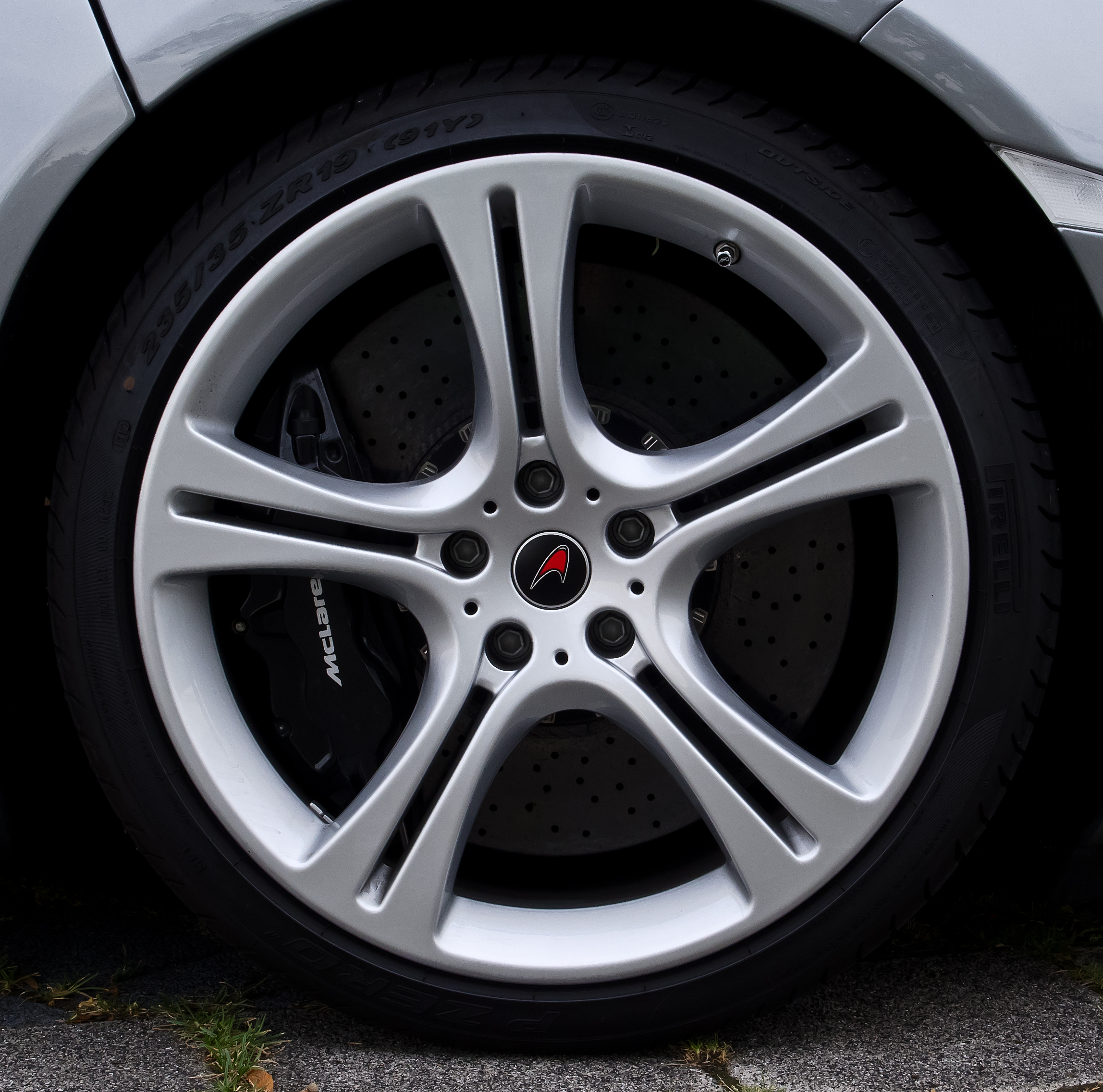 McLaren MP4-12C